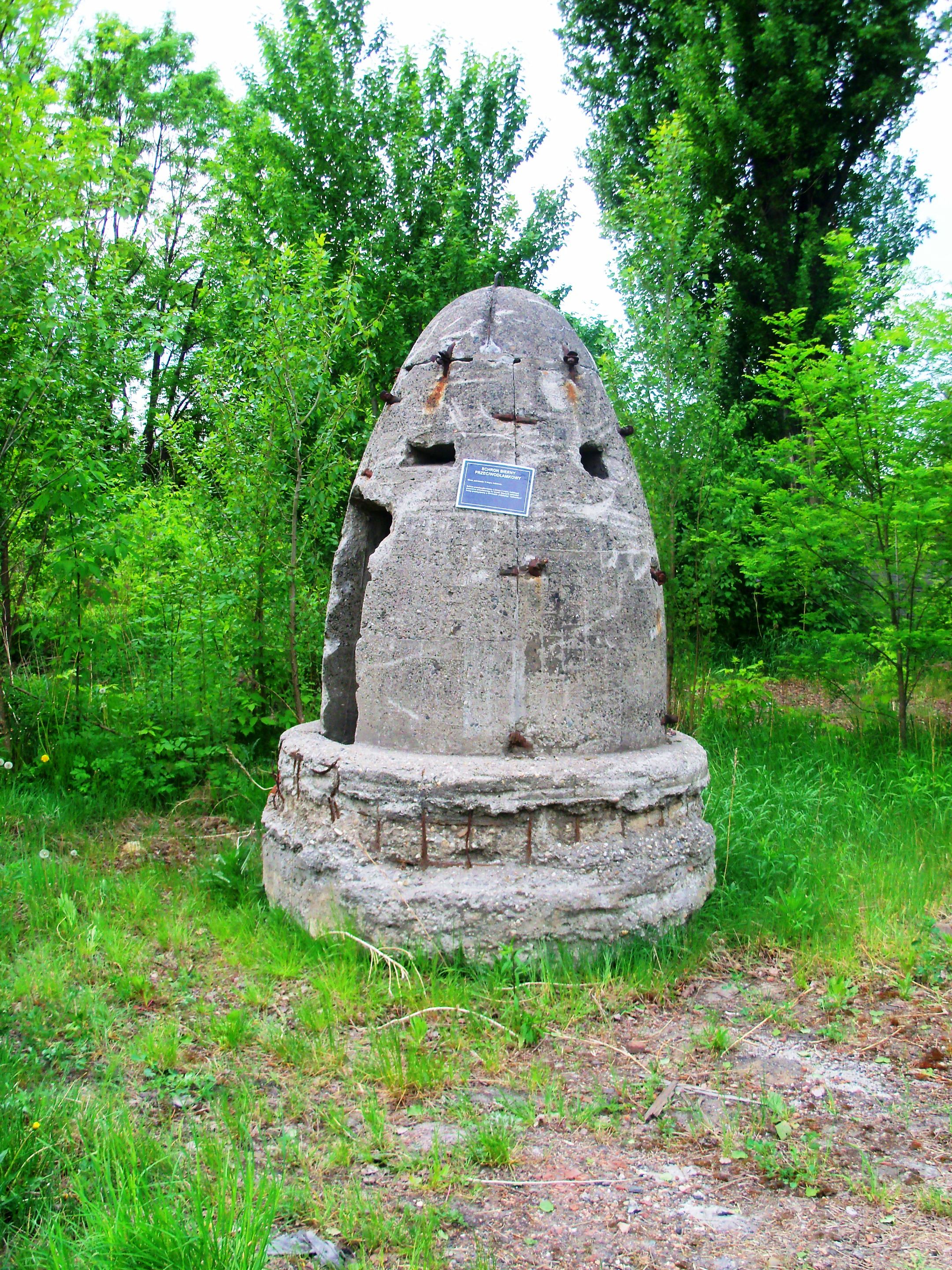 Tereny dawnej kopalni Katowice. Schron Bojowy. Zdjęcie wykonane podczas Nocy Muzeów 2011